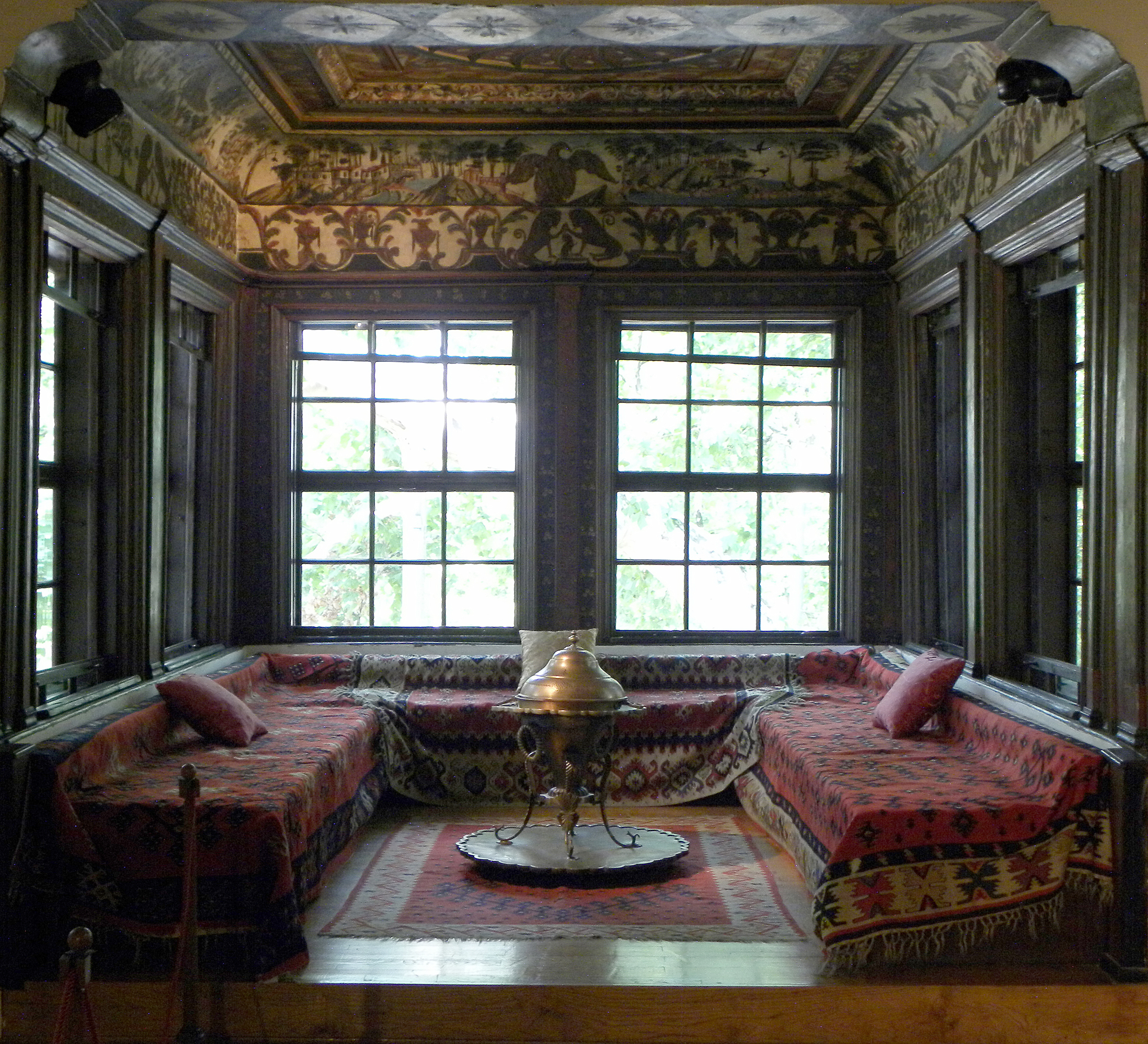 Beograd Konak kneza Miloša